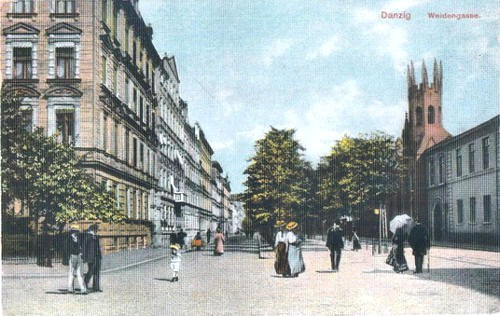 Ulica Łąkowa w Gdańsku (po prawej w głębi kościół p.w. Niepokalanego Poczęcia NMP).